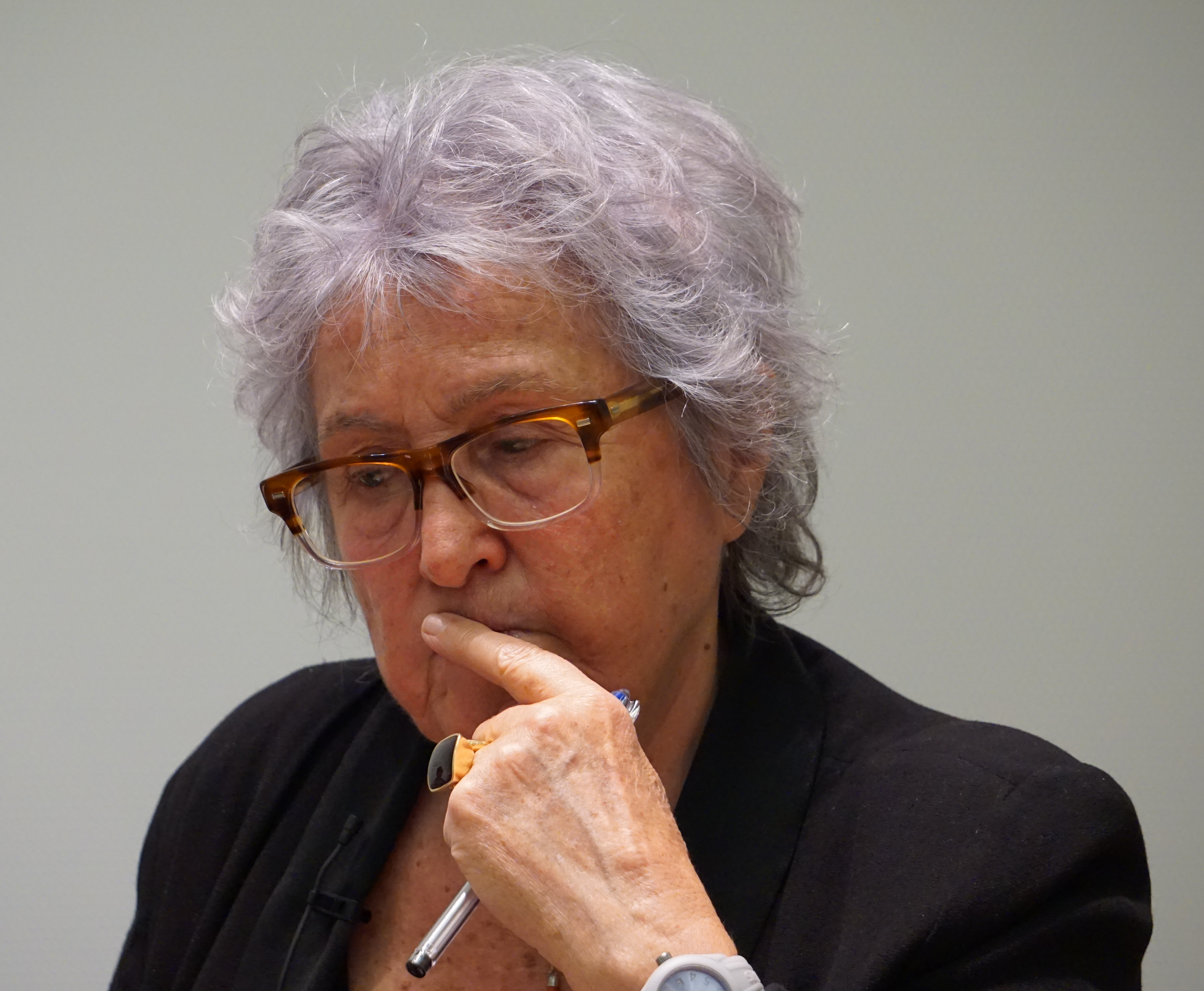 Casa Árabe. Madrid 2016